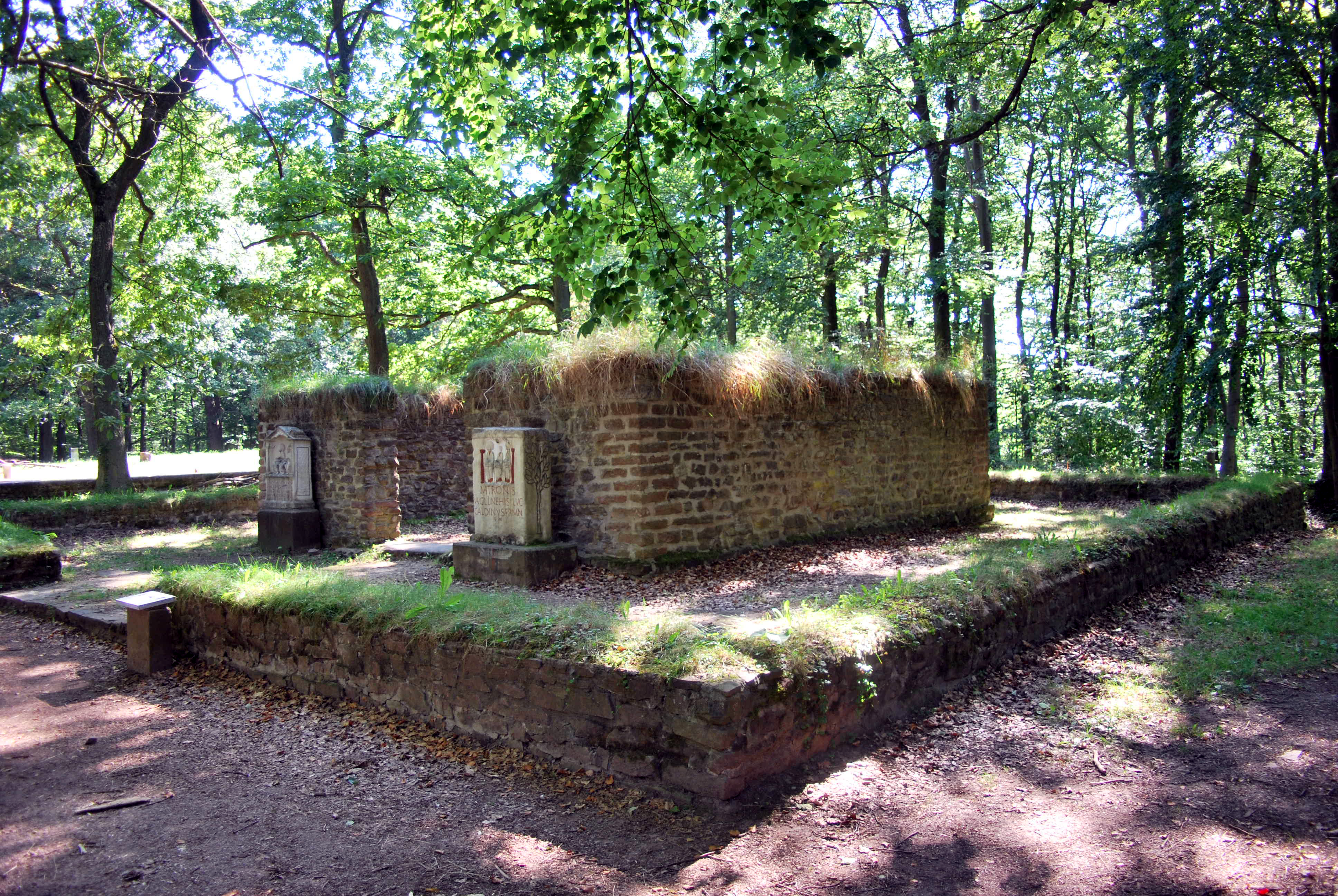 Gallorömischer Umgangstempel bei Nöthen